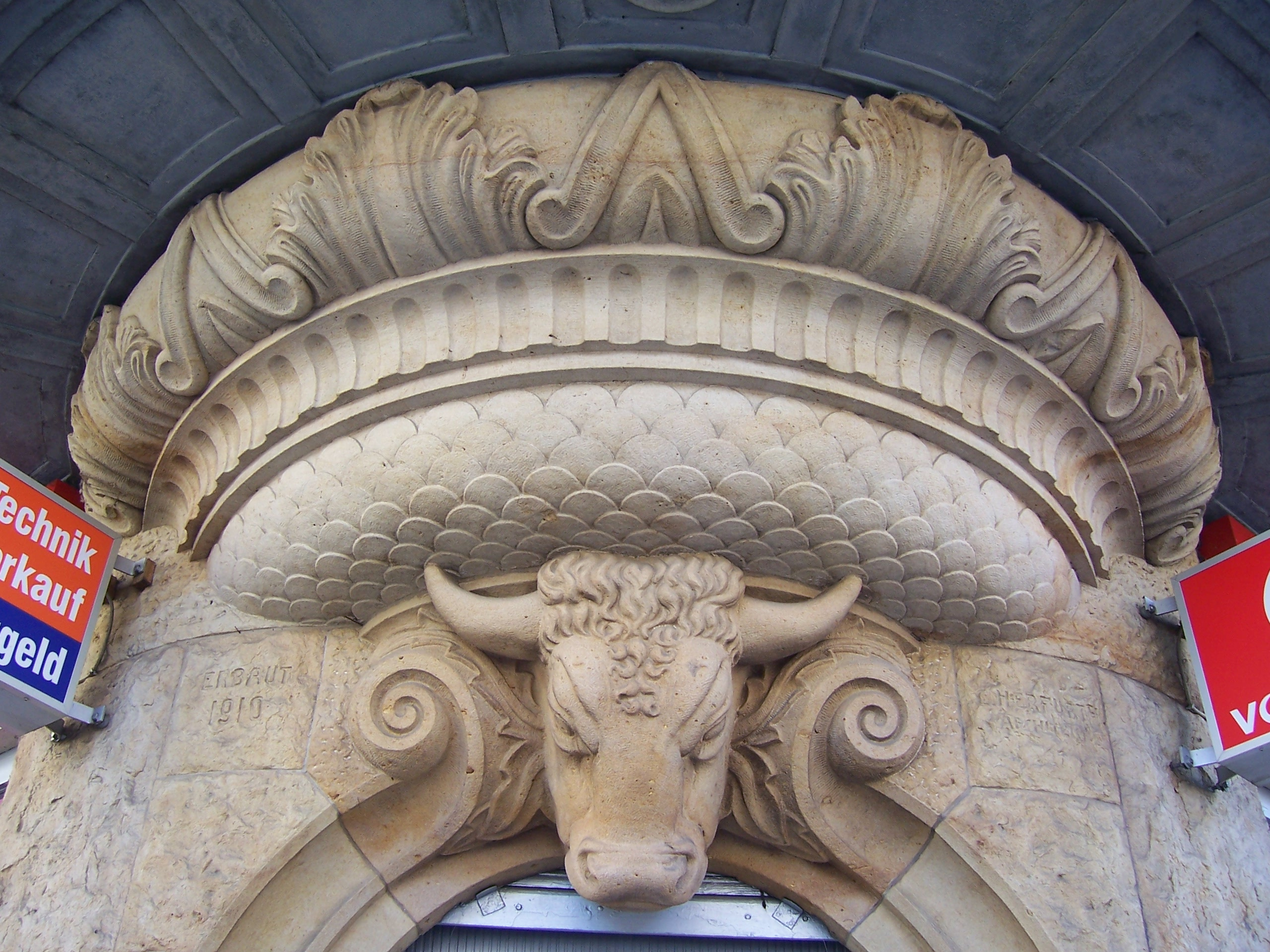 Wohn- und Geschäftshaus Hoyerswerdaer Straße 39, Dresden, Detail mit Inschrift von Architekt Curt Herfurth (rechts)